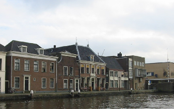 alphen aan den rijn huizen langs de oude rijn (zelf gemaakte foto)